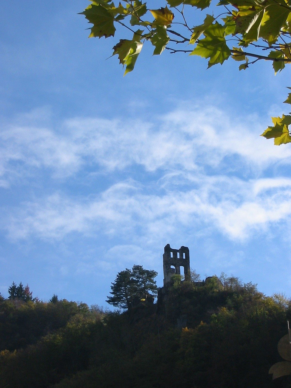 Bildbeschreibung: Grevenburg bei Traben-Trarbach Fotograf: Lokilech Datum: siehe Metadaten